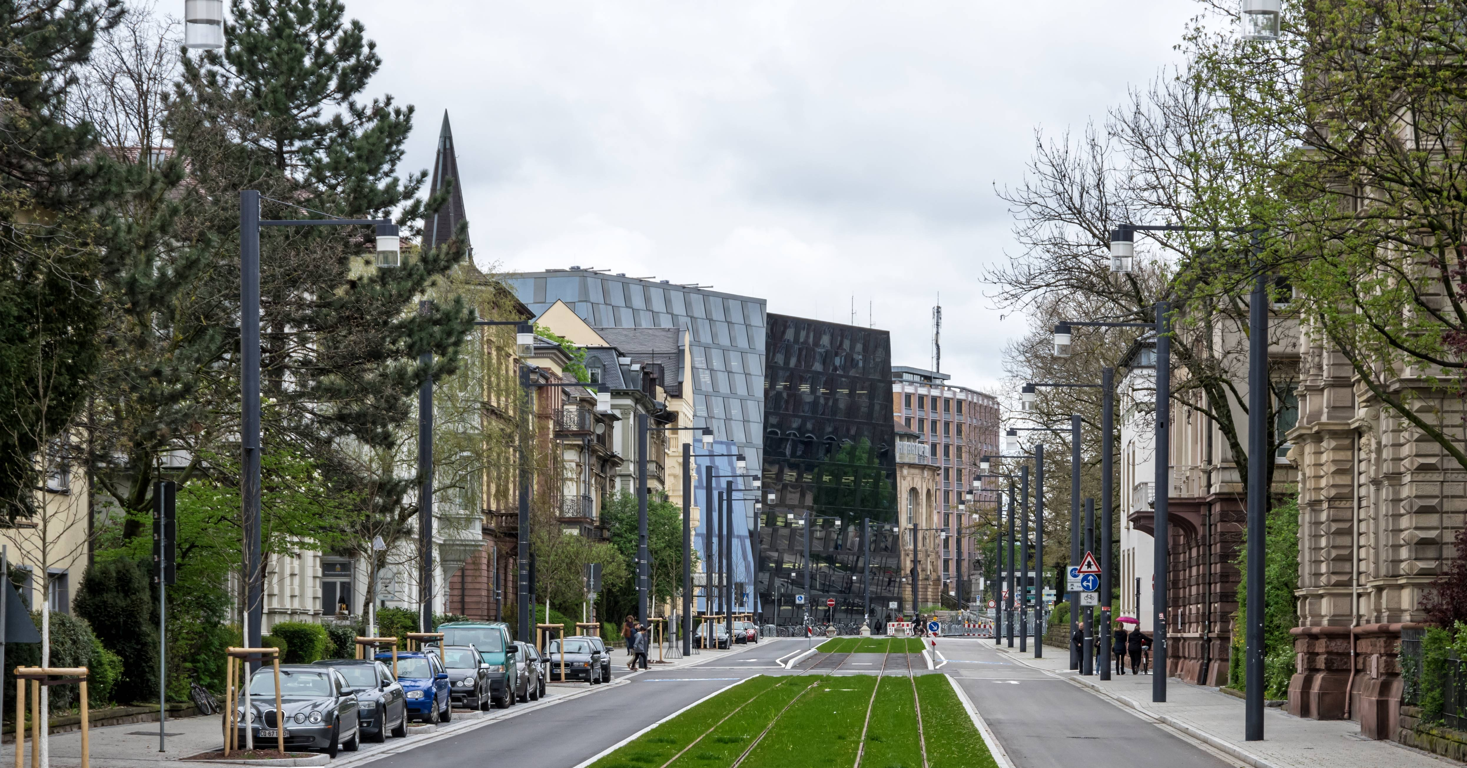 Bilder aus Freiburg im Breisgau Blick in die Werthmannstraße. Im Hintergrund die neue UB